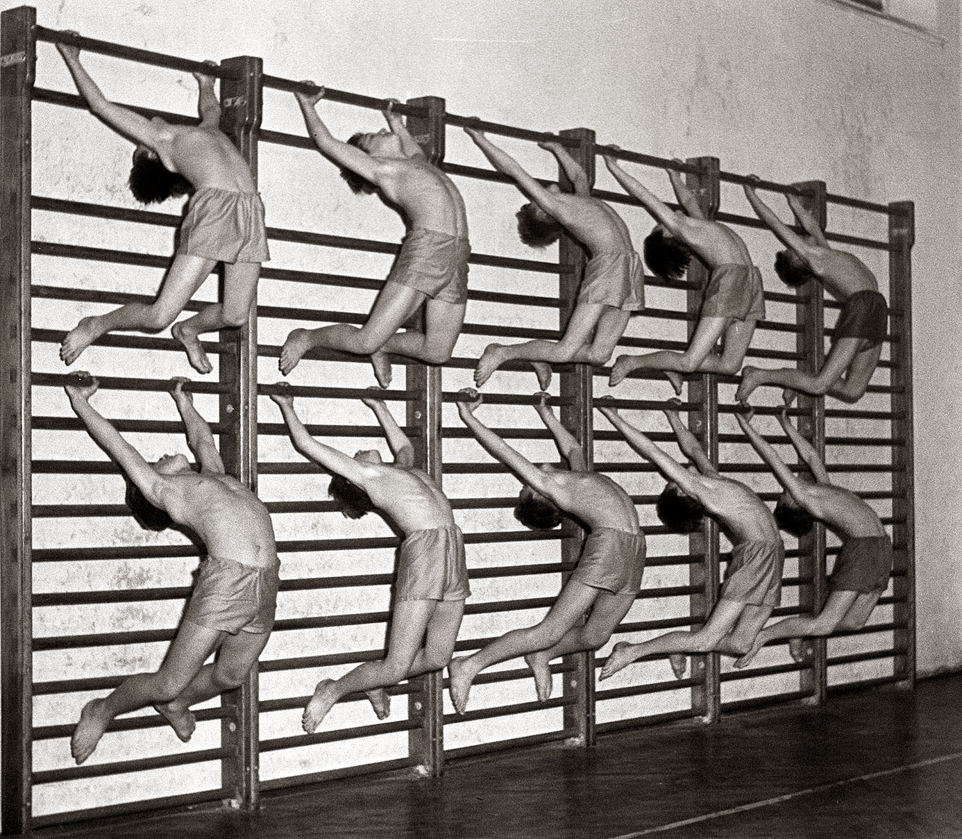 Dijaki 7. gimnazije v Mariboru pri telovadbi